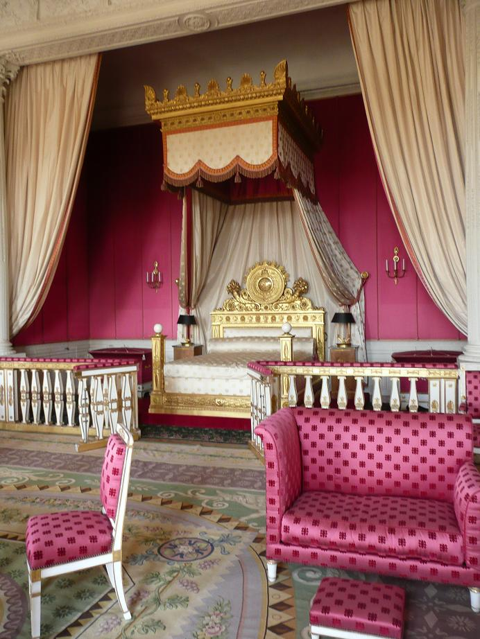 Chambre dite de l'Impératrice au Grand Trianon à Versailles. Lit de parade (1809) crée d'après le dessin de Charles Percier (1764-1838) par l'ébéniste François-Honoré Jacob dit Jacob Desmalter (1770-1841) pour la chambre impériale de Napoléon Ier au Palais des Tuileries d'où il a été transporté à sa place actuelle en 1838. Ce lit a fait l'objet de plusieurs modifications. Son grand écusson a été plusieurs fois remanié et la couche a été élargie sous Louis-Philippe. Baldequin dit à la duchesse (pour sa forme) ou à l'Impériale (pour la structure en menuiserie du dais), fixé au mur. Balustrade Empire d'origine (1810) par Pierre-Benoît Marcion (1769-1840).